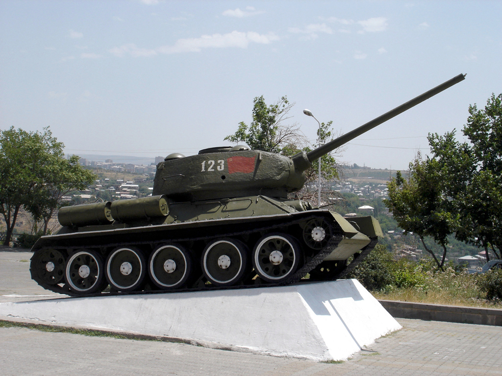 Erevan, T 34